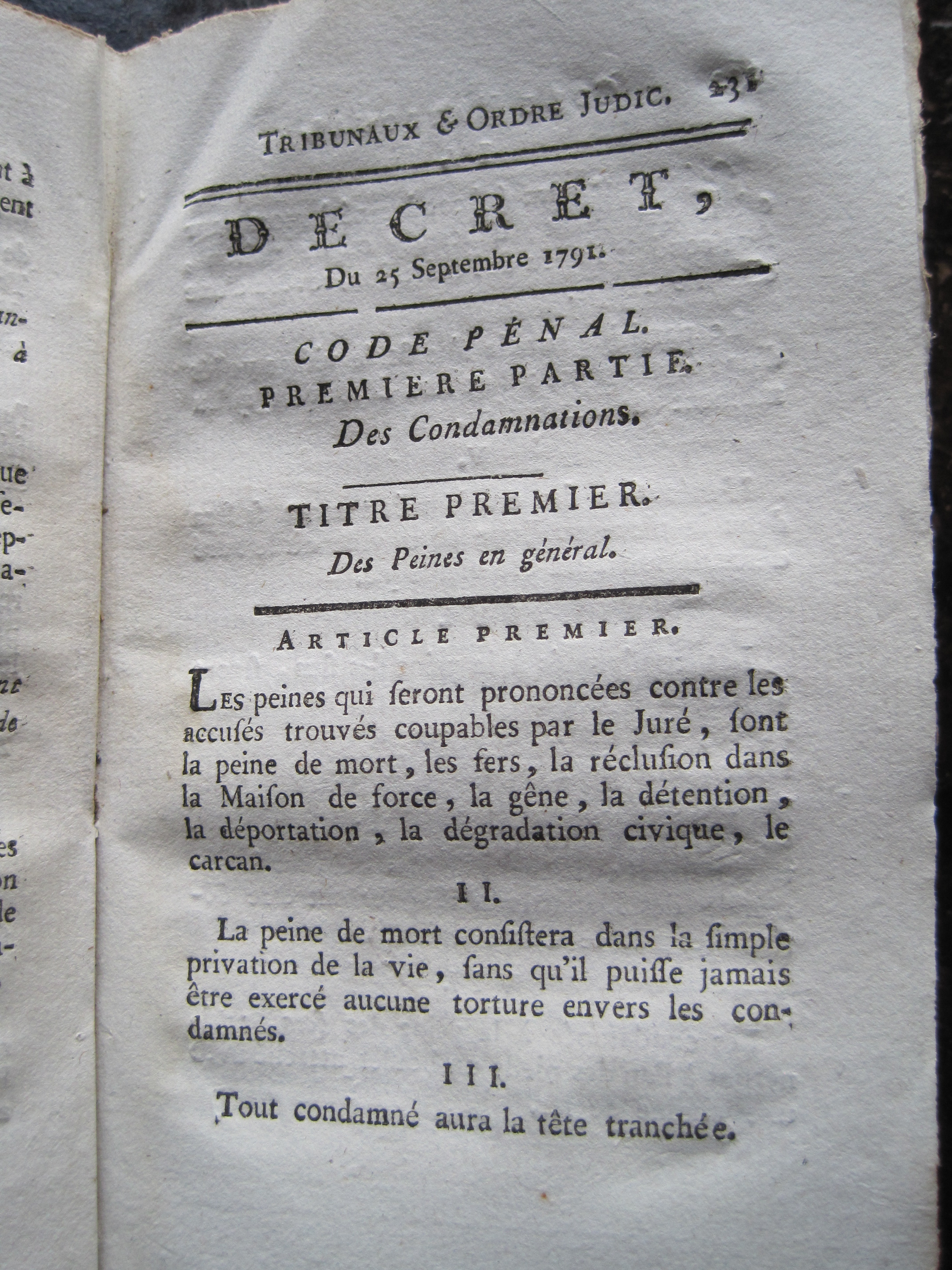 Code National, ou recueil de tous les Décrets de l'Assemblée Nationale, rangés par ordre de matières, avec un extrait des motions dont la connaissance est nécessaire pour l'intelligence des décrets et détails historiques et politiques sur chaque partie changée par le nouveau régime ... Depuis le 4 mai 1789 jusqu'à présent. XIIIème Partie, contenant la suite du chapitre VIII, ou supplément aux tribunaux & à l'Ordre Judiciaire.. Tome XI faisant la XIIIème partie A Caen, Chez G. Le Roy, M, DCC, XCII